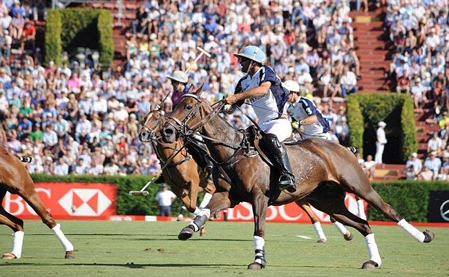 La Final del Argentino Abierto 2014